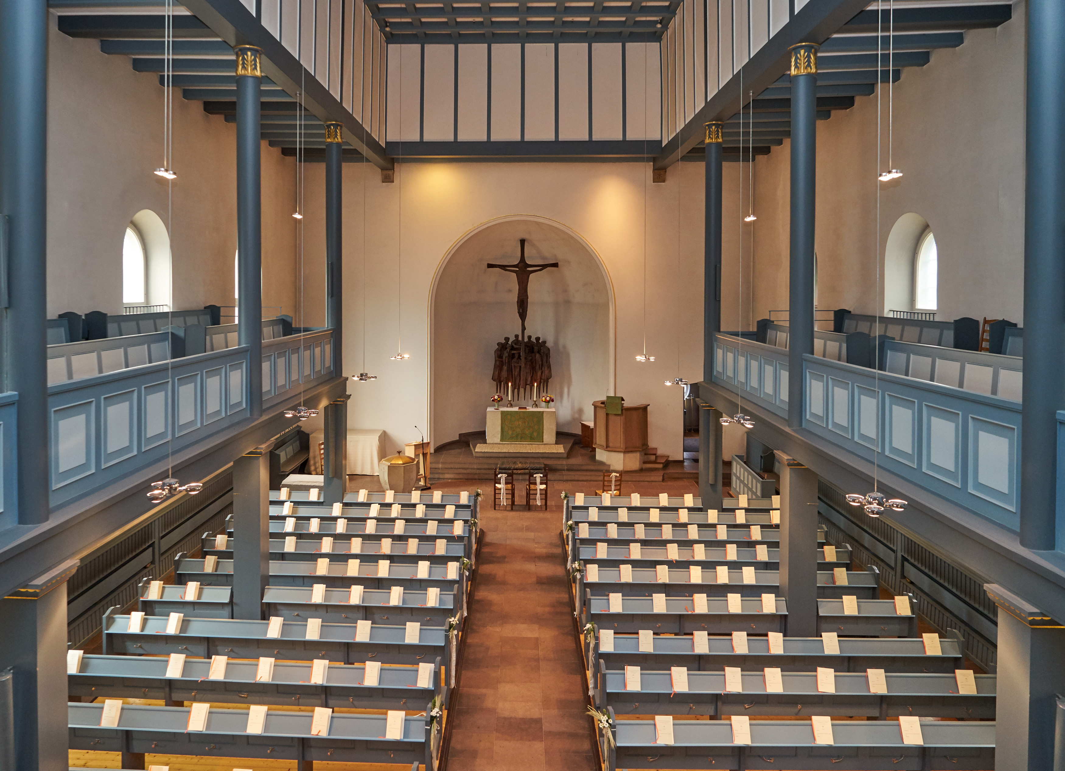 Horner Kirche in Bremen, Horner Heerstraße 30. Blick von der Empore: Apsisnische mit Altar aus Obernkirchener Sandstein. Das Kruzifix von Claus Homfeld stellt eine Kreuzigungsgruppe dar. Taufstein in Form eines Oktogons, Kanzel aus Eichenholz in Form eines Mehrecks.Das abgebildete Objekt ist ein geschütztes Kulturdenkmal in der Freien Hansestadt Bremen, mit der Nr. 0623 beim Landesamt für Denkmalpflege registriert.